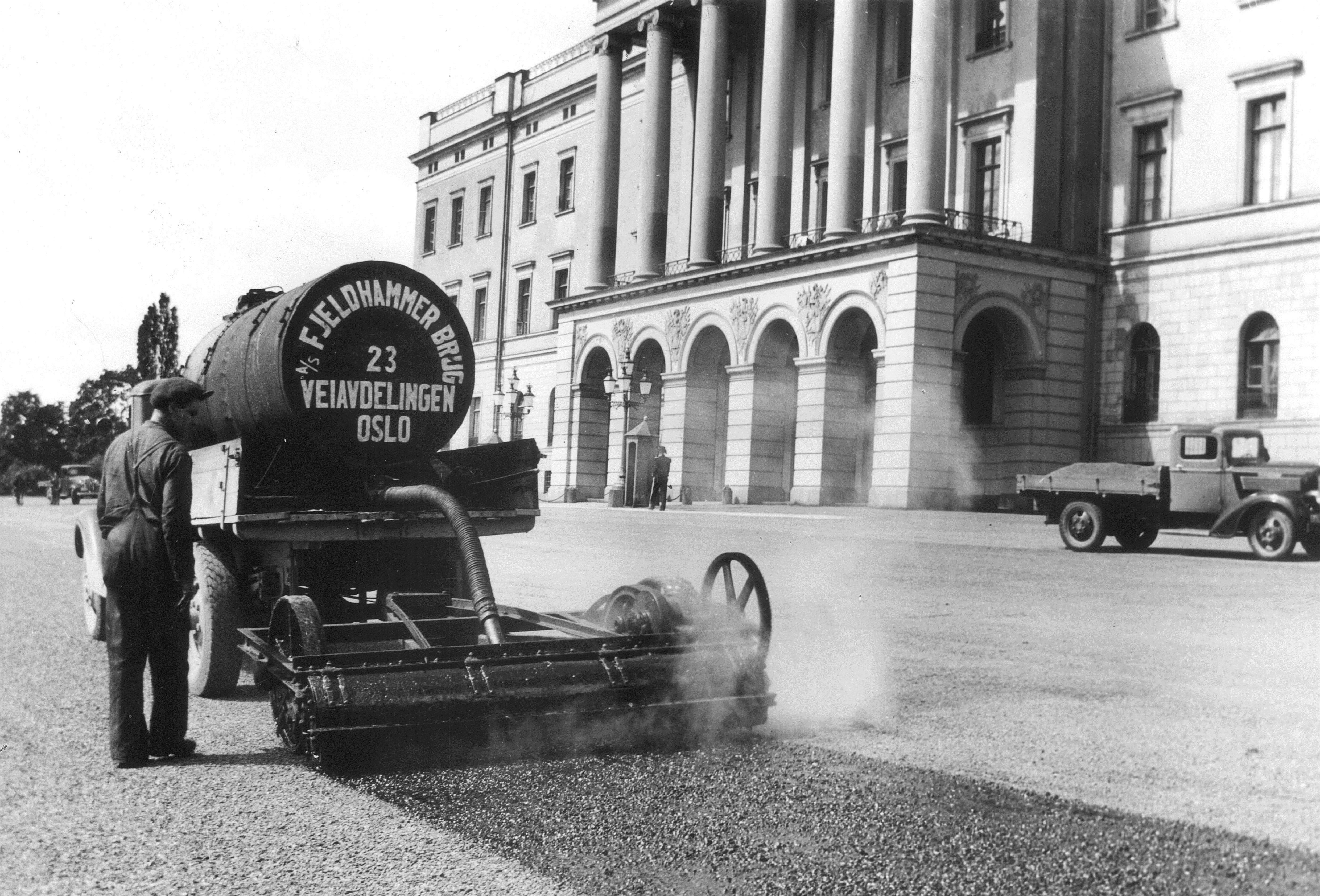 Arbeider på Slottet 1938.